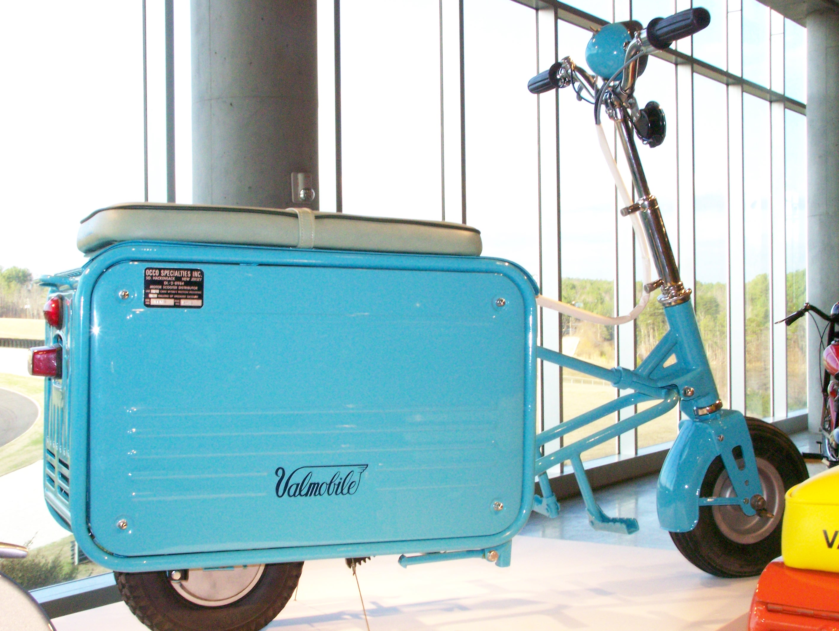 Barber Vintage Museum_535 Hirano Valmobile